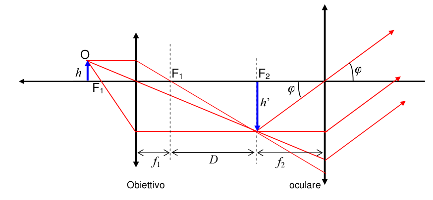 Schema ottico del funzionamento di un microscopio